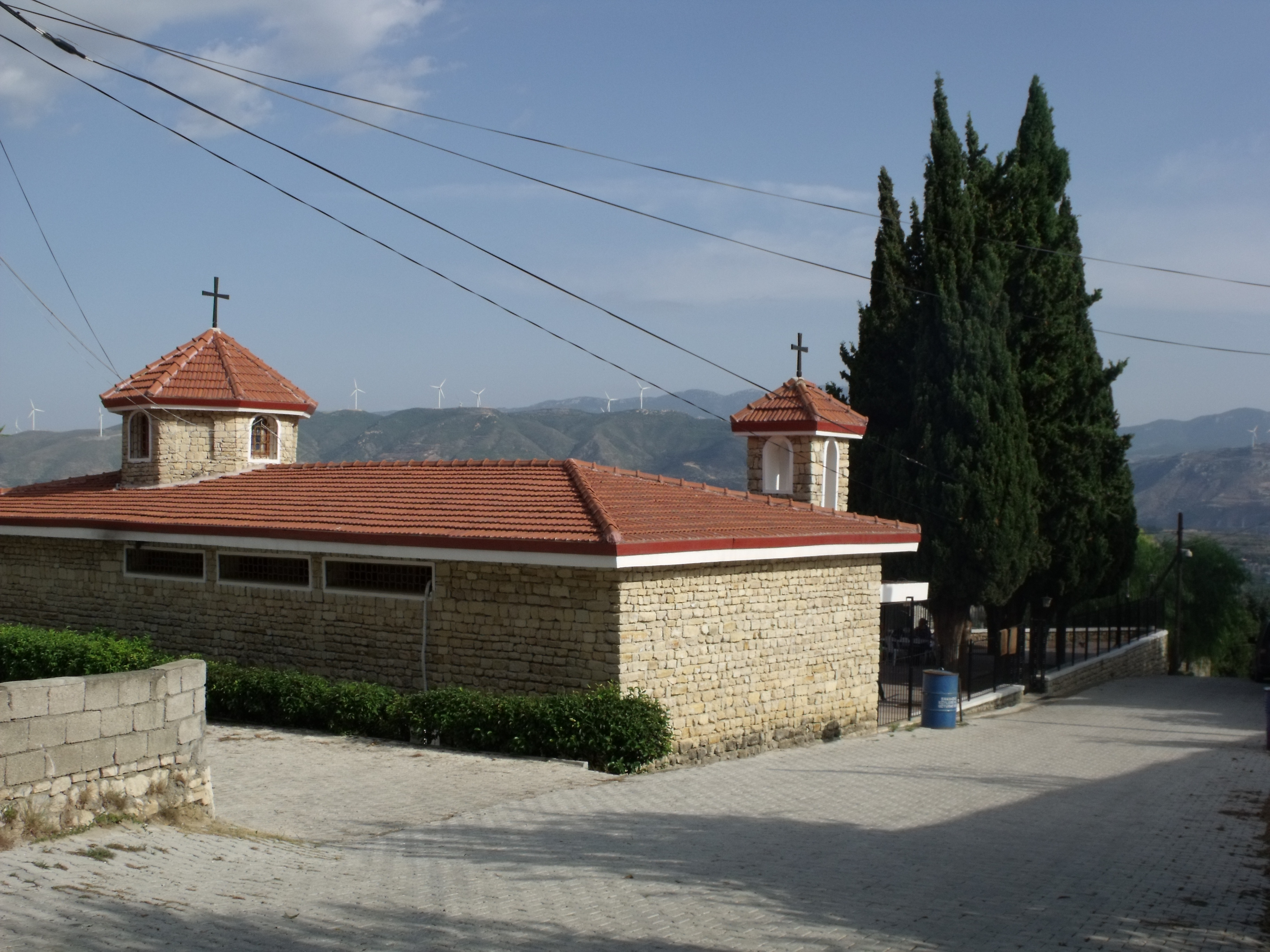 HATAY SAMANDAĞ- VAKIFLI EYLÜL 2011